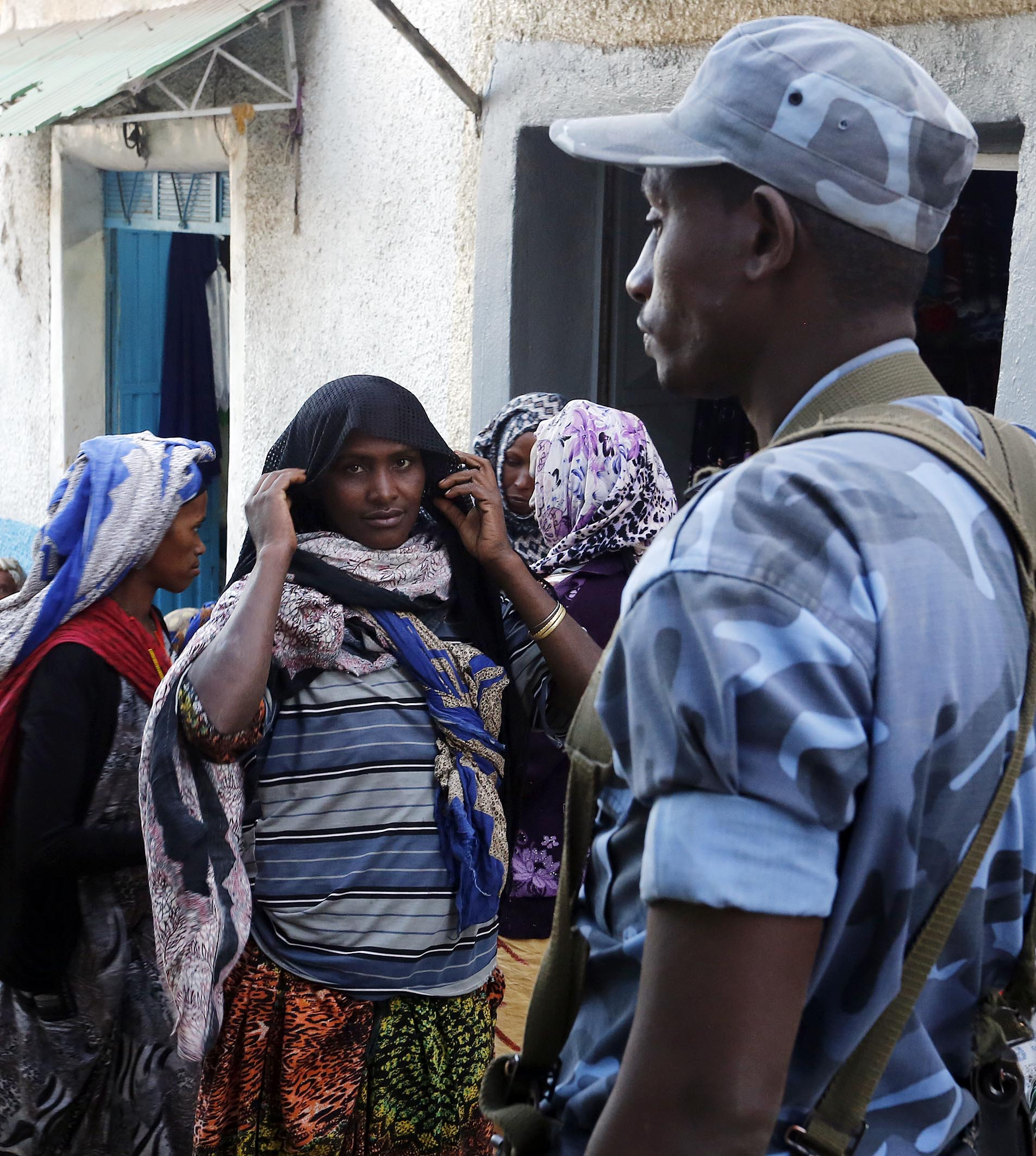 Arbeitsbesuch Äthiopien. Bundesminister Sebastian Kurz. Strassenszene Harar. 01.02.2016, Foto: Dragan Tatic